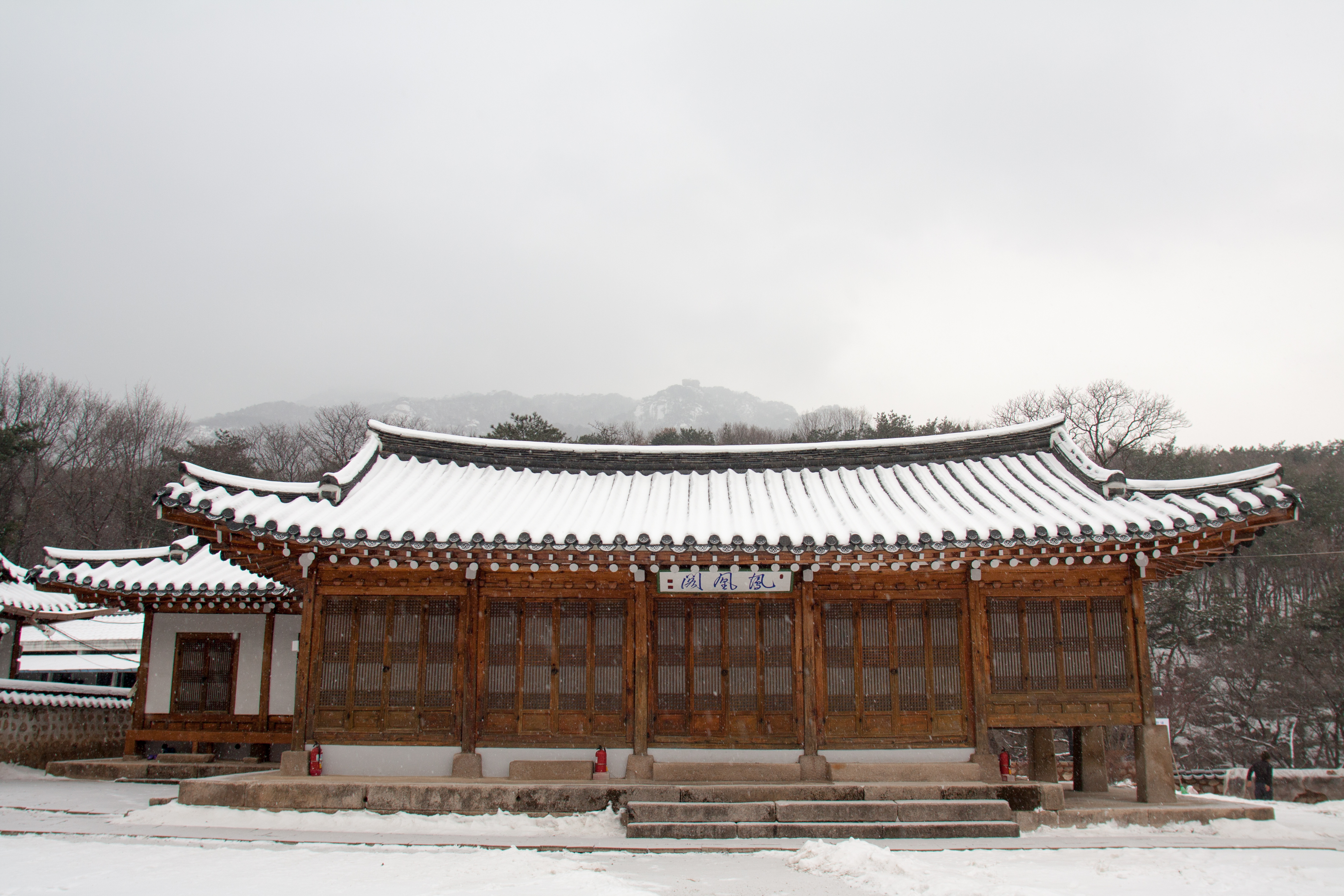 봉황각